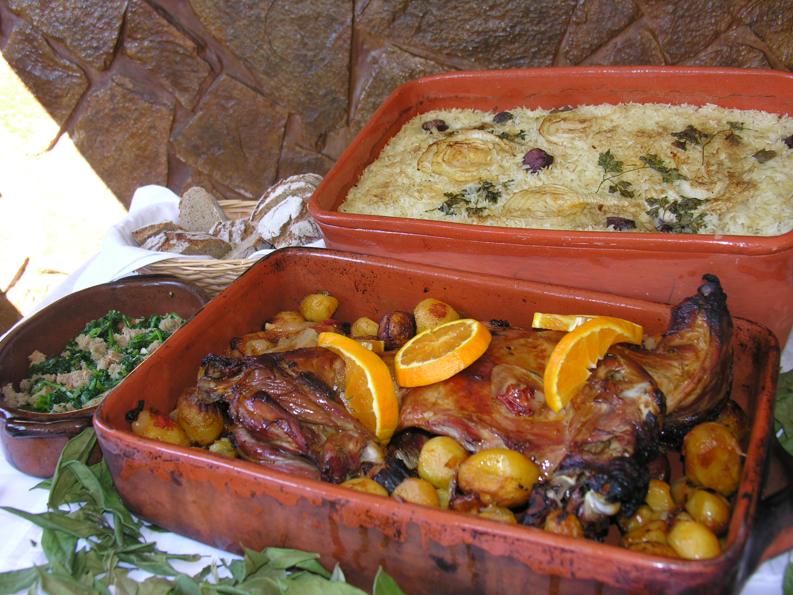 Cabrito Assado Paredes